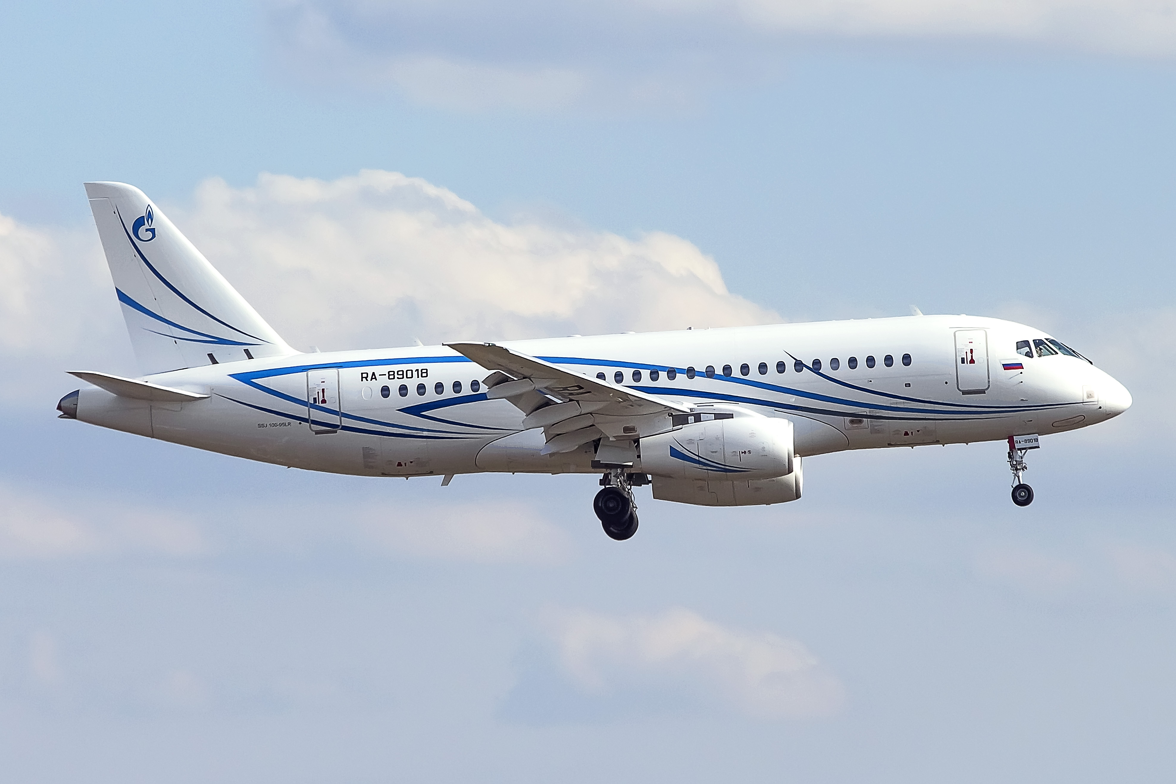 YABLIN MCGRE